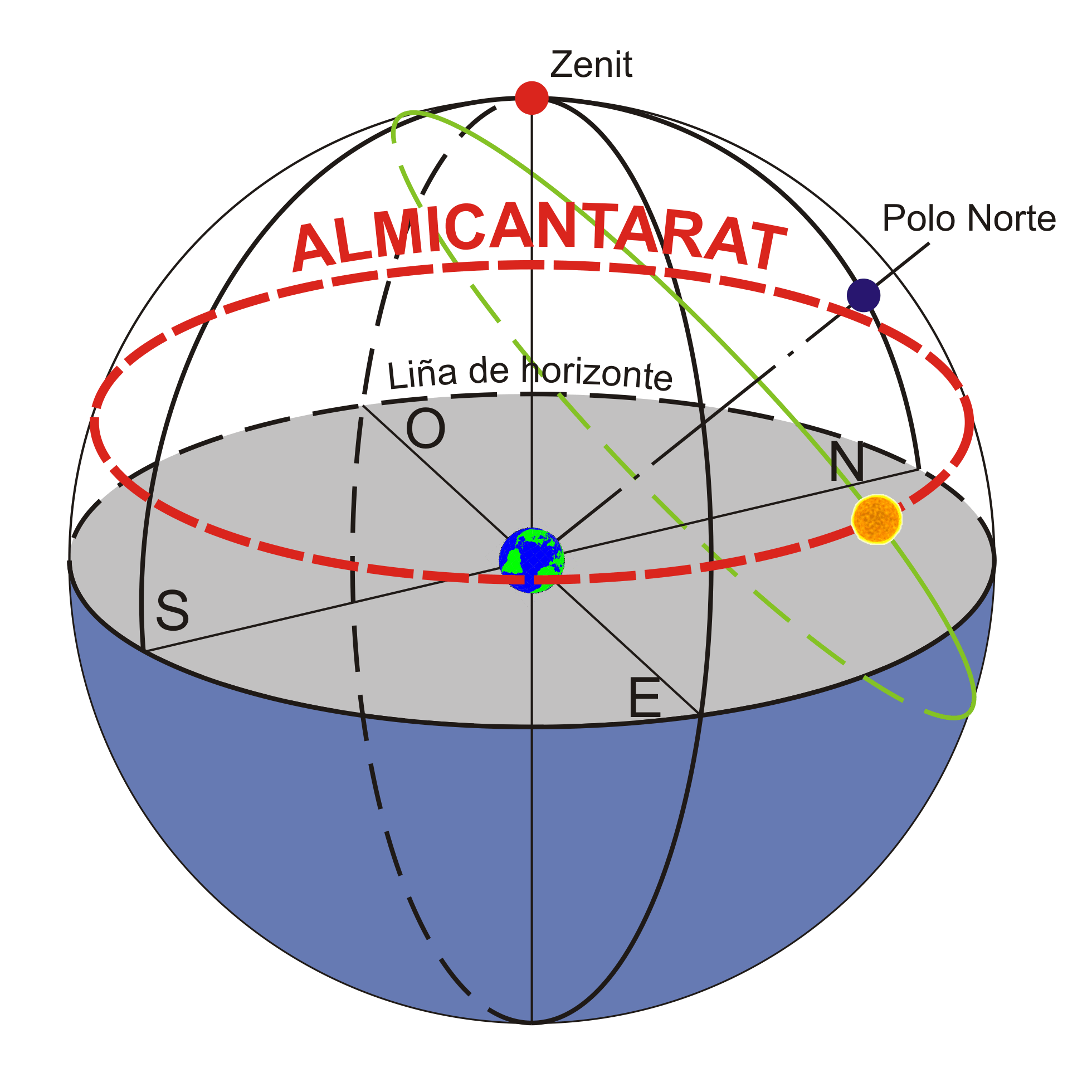 Liña imaxinaria (en vermello e a trazos) que indica a altura sobre o horizonte dun astro.